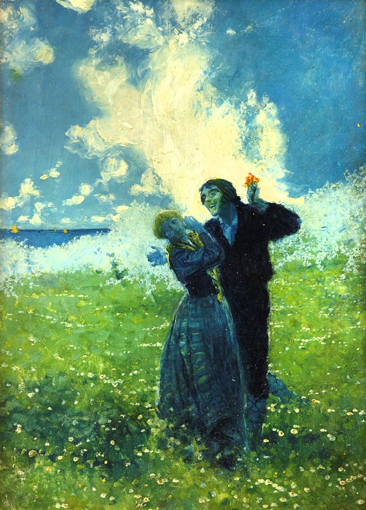 L'amour en bleu, 50 x 40cm, olio su tela